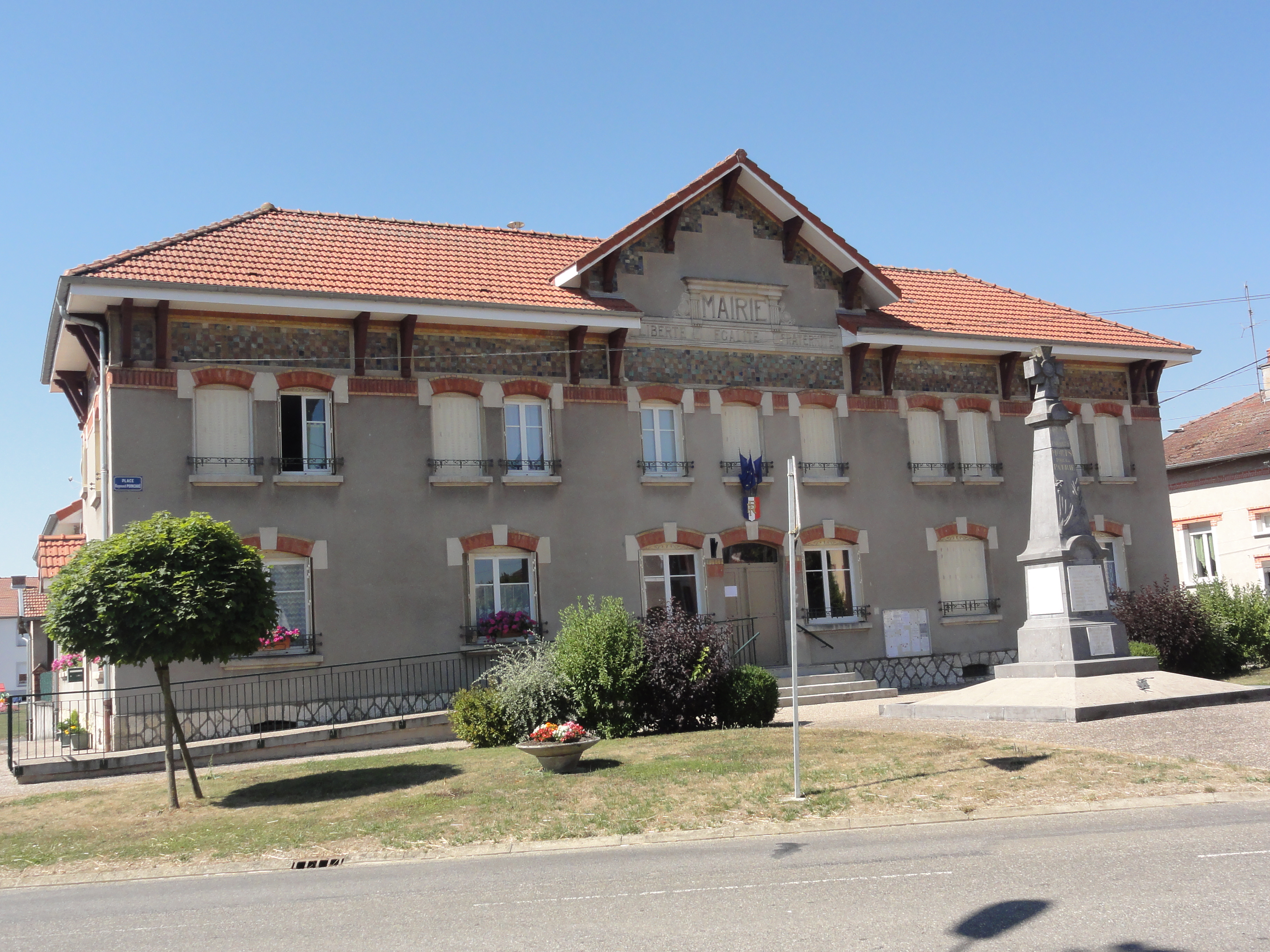 Forges-sur-Meuse (Meuse) mairie